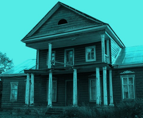 Помещичья усадьба Вахрамеева